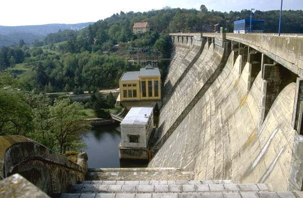 Die Talsperre von Vranov nad Dyji-Frain an der Thaya